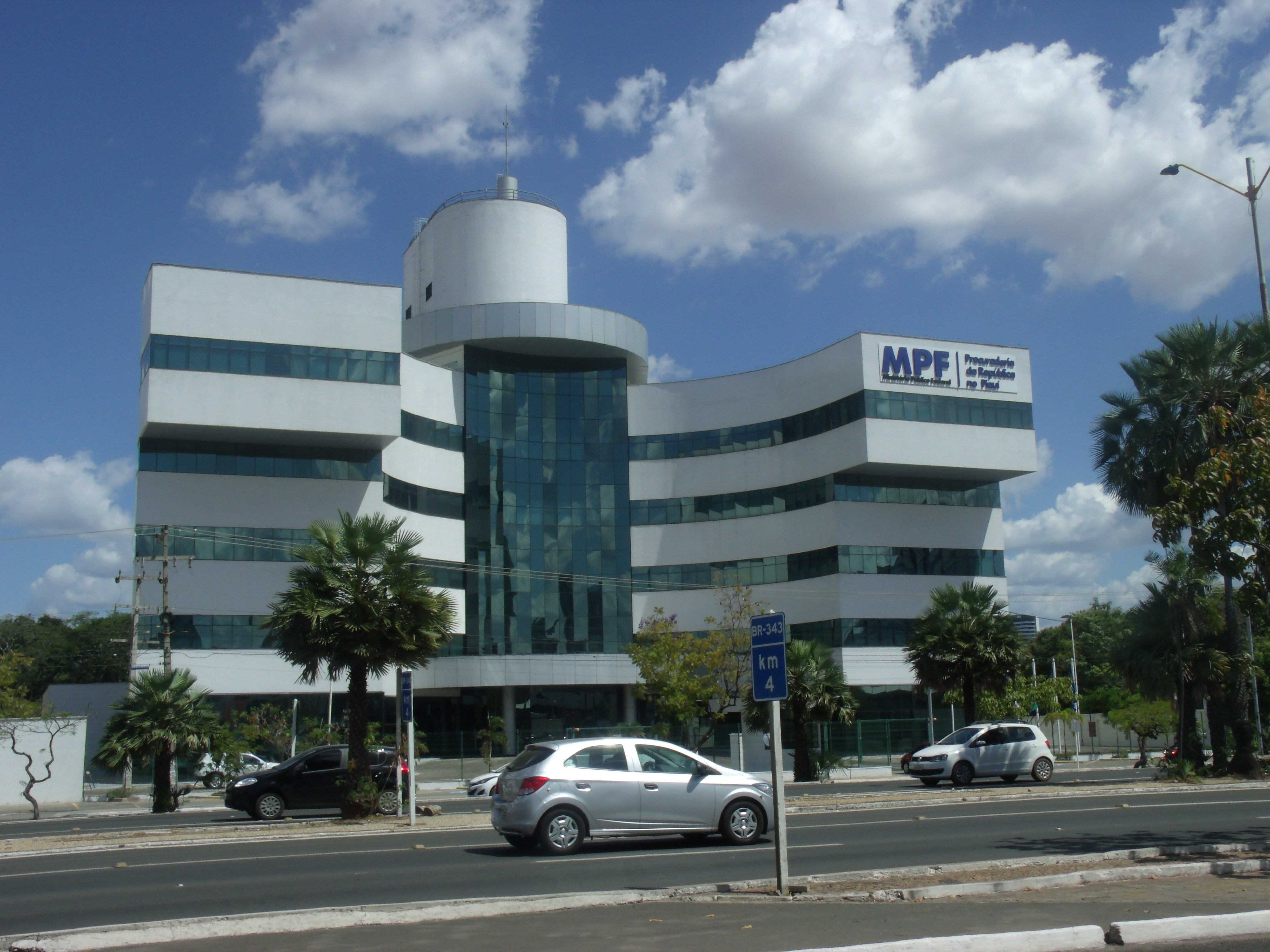 Edifício do Ministério Público Federal do Piauí.